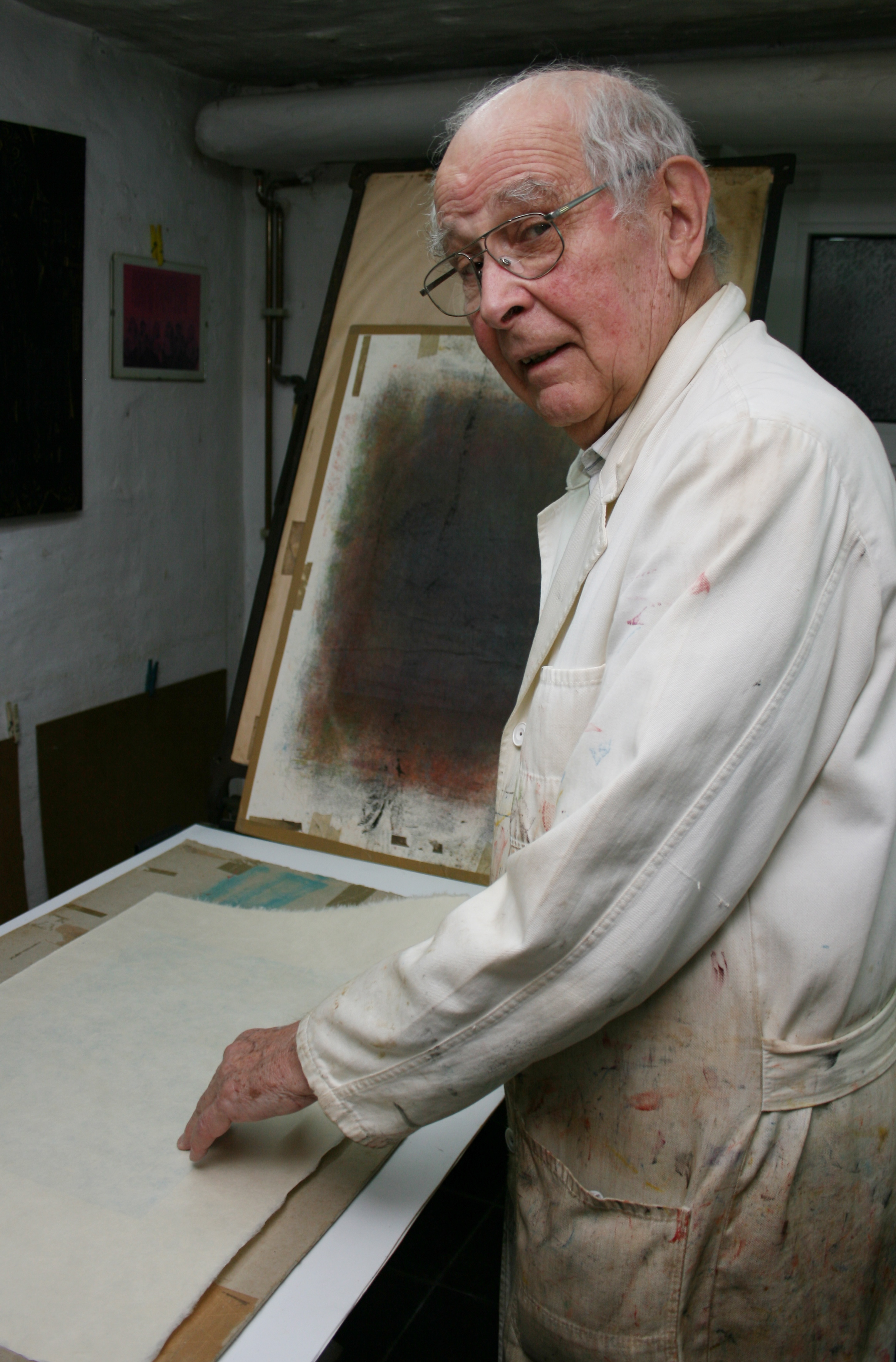 Portrait von Alfred Pohl